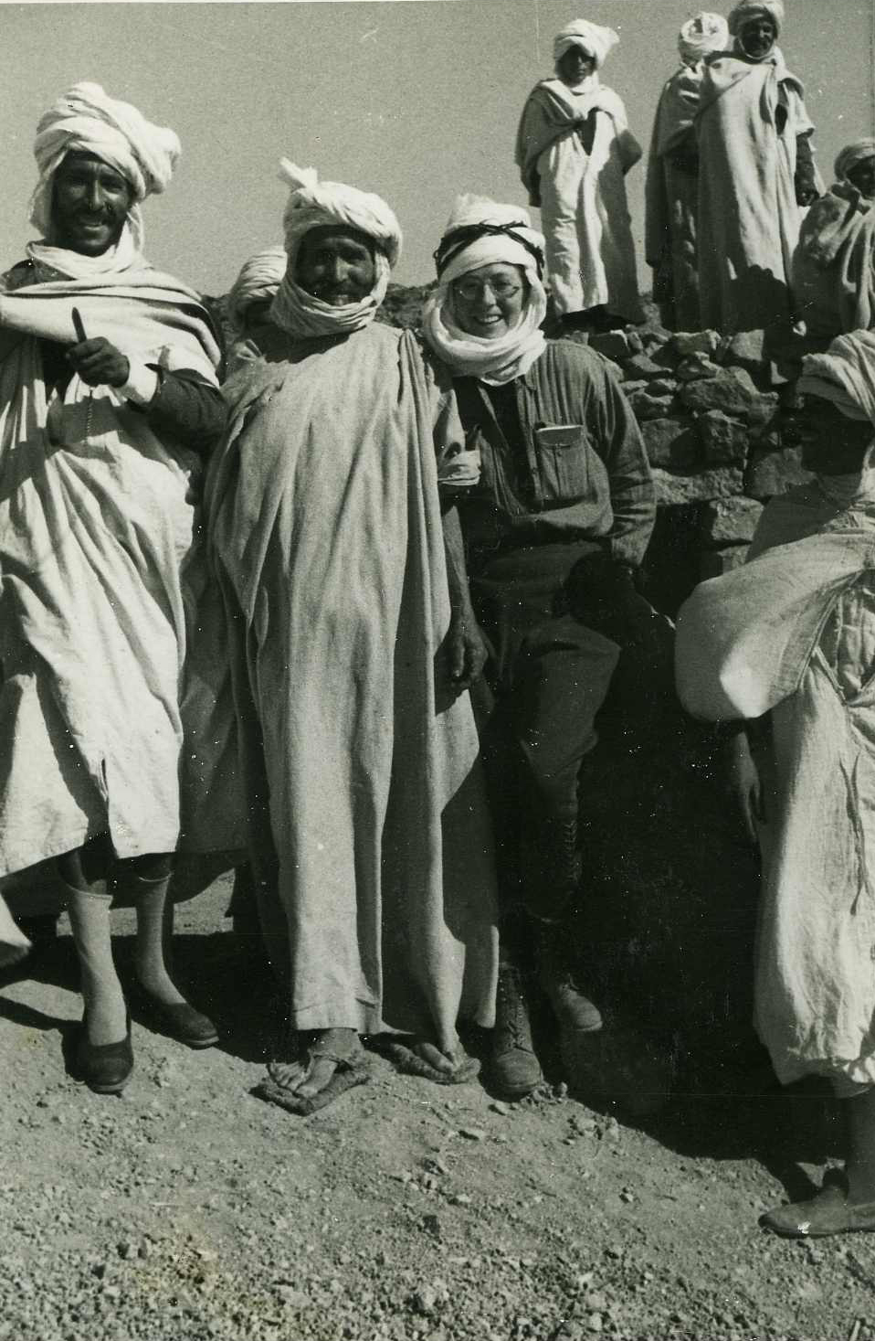 Photographie de Thérèse Rivière dans sa première mission en Algérie dans les Aurès (1935-1936)